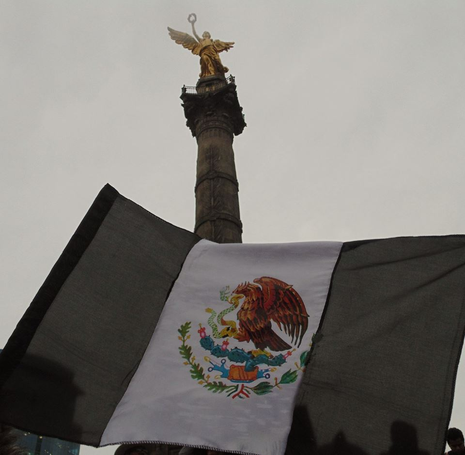 Bandera de luto en la marcha del 20 de noviembre